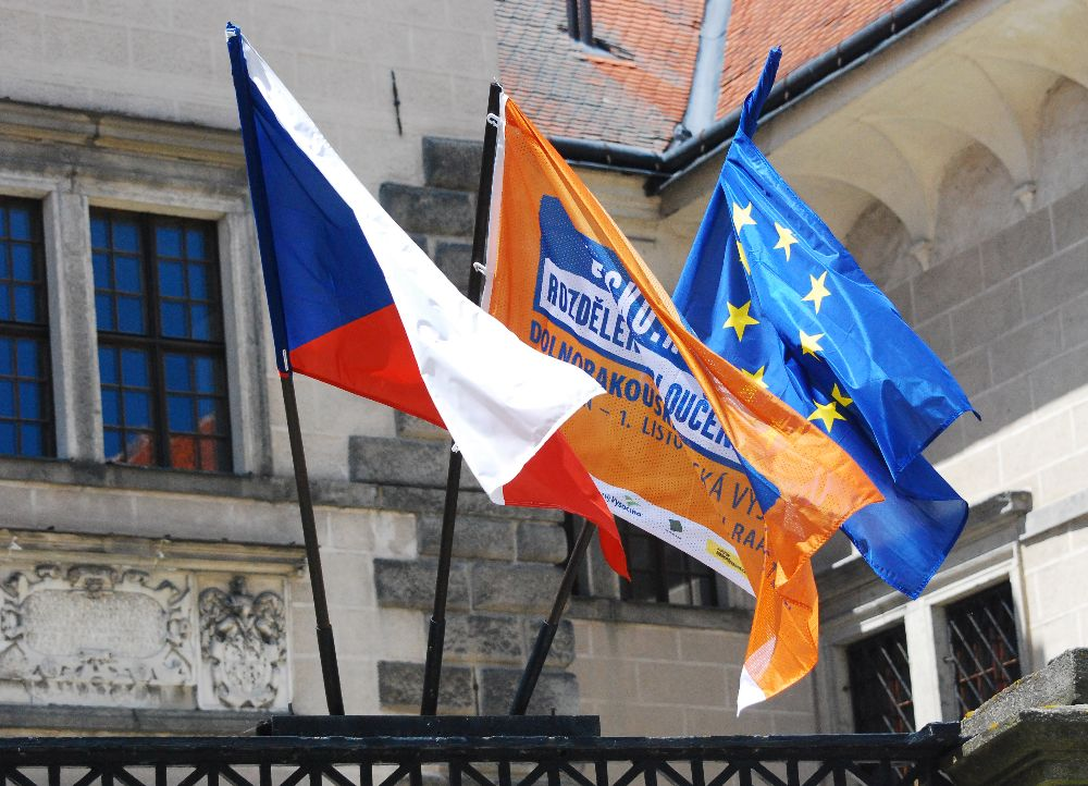 Fahnen auf Schloss Telc anlässlich der Niederösterreichischen Landesausstellung 2009